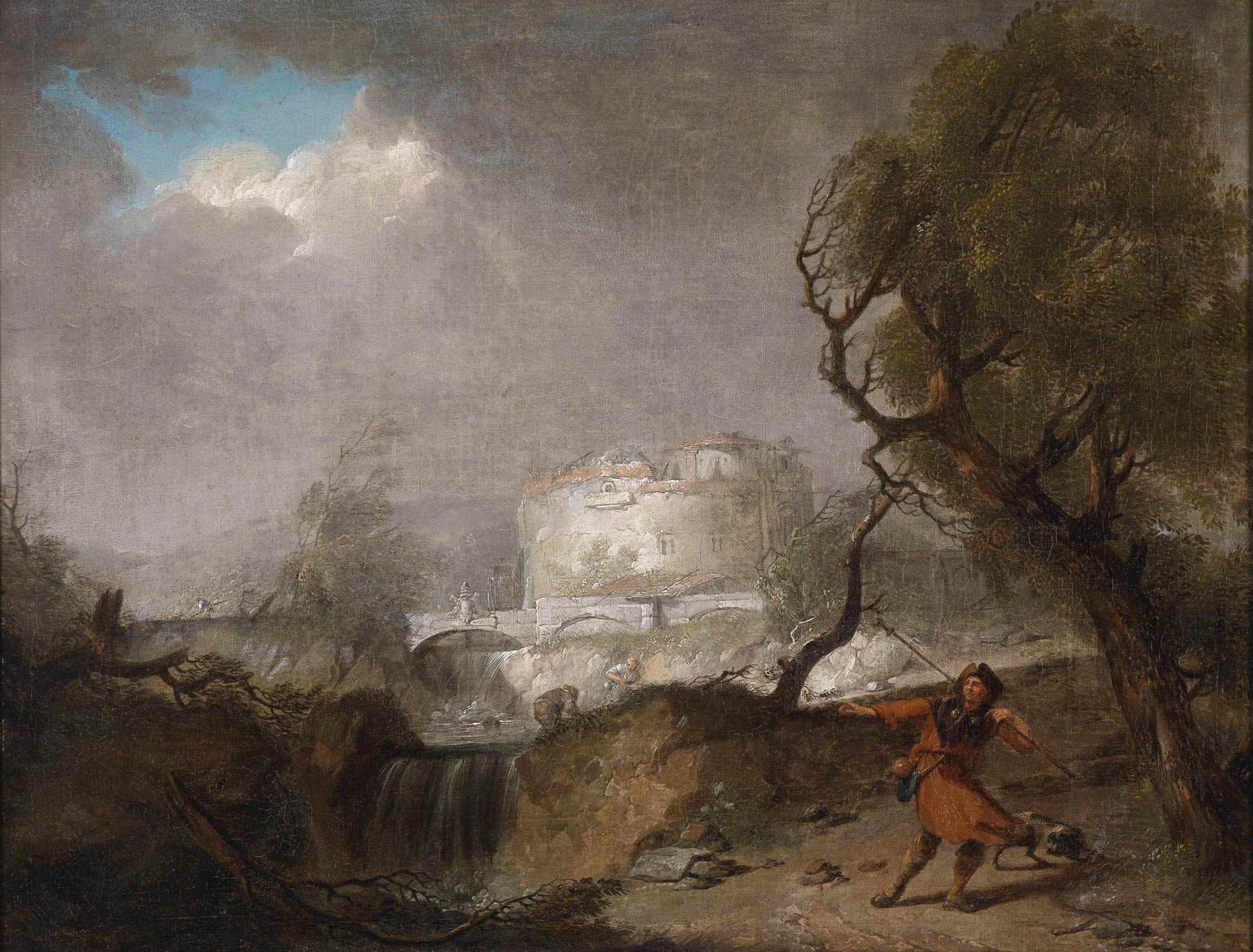 Hendrik Meijer, (Amsterdam 1737-1793 London), Italienische Gewitterlandschaft Öl/Lw.46 x 60 cm